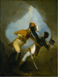 Pintura: Duelo o Desafío